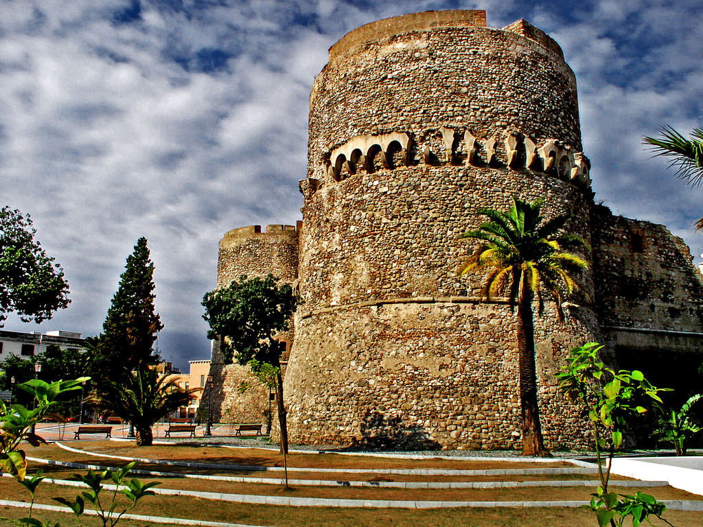 Castello aragonese di Reggio Calabria